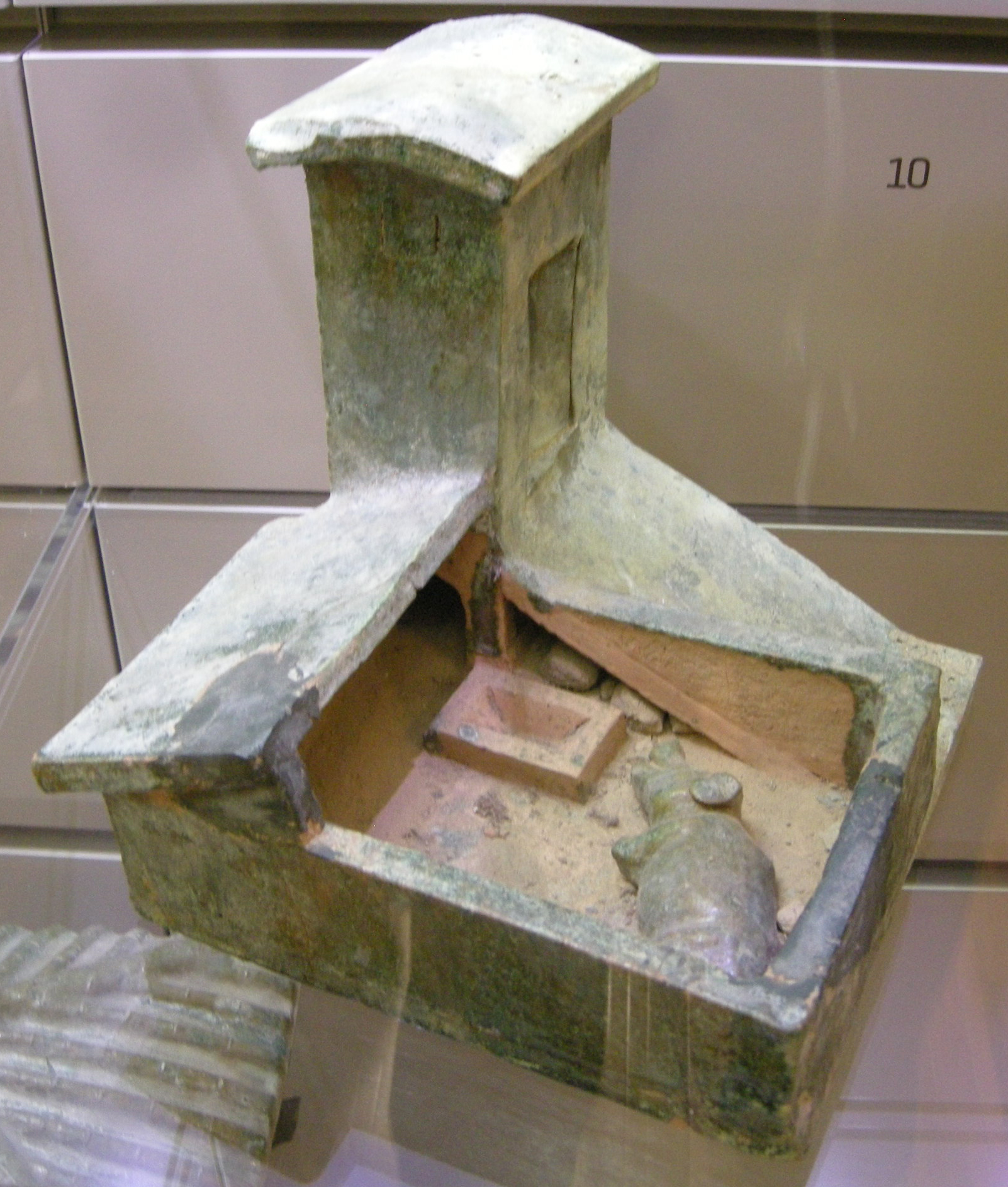 Cina sett.le, han orientali, modellino di porcile con latrina, II sec